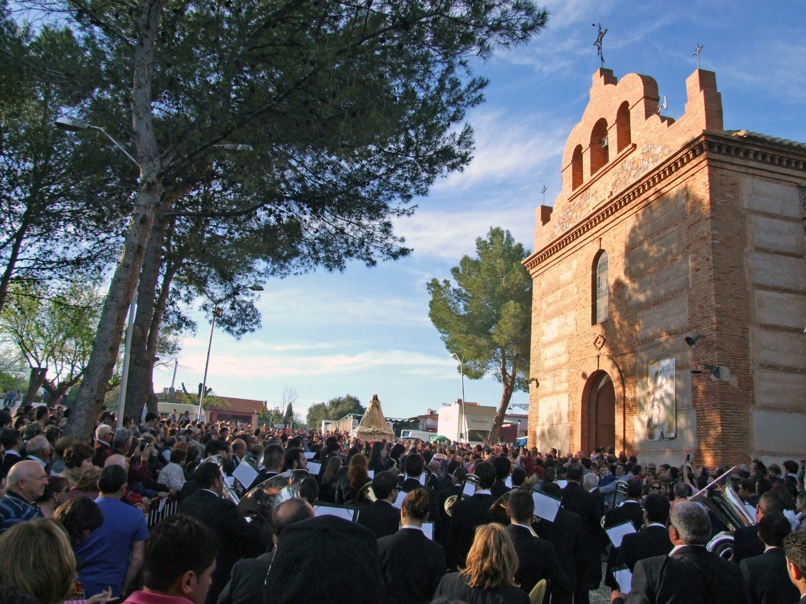 La Virgen del Monte llegando a la puerta de la ermita en la procesión de la romería 2016